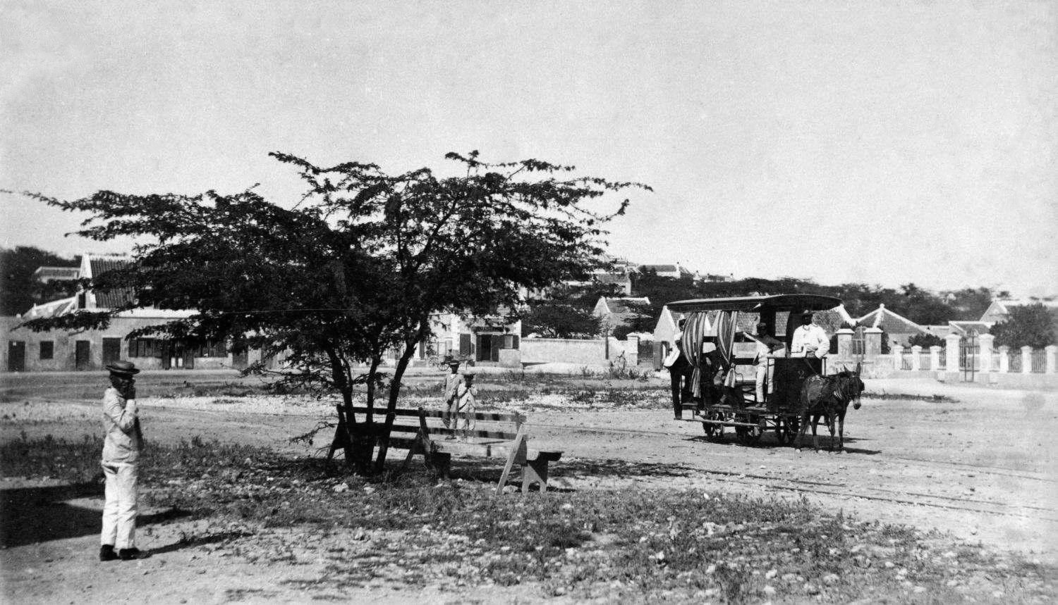 Halte van de paardentram tussen de stadsdelen Scharloo en Piermaai. Curaçaose tram